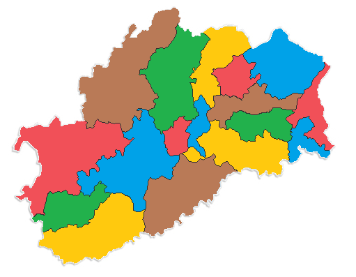 Les 17 nouveaux Cantons de la Haute-Saône